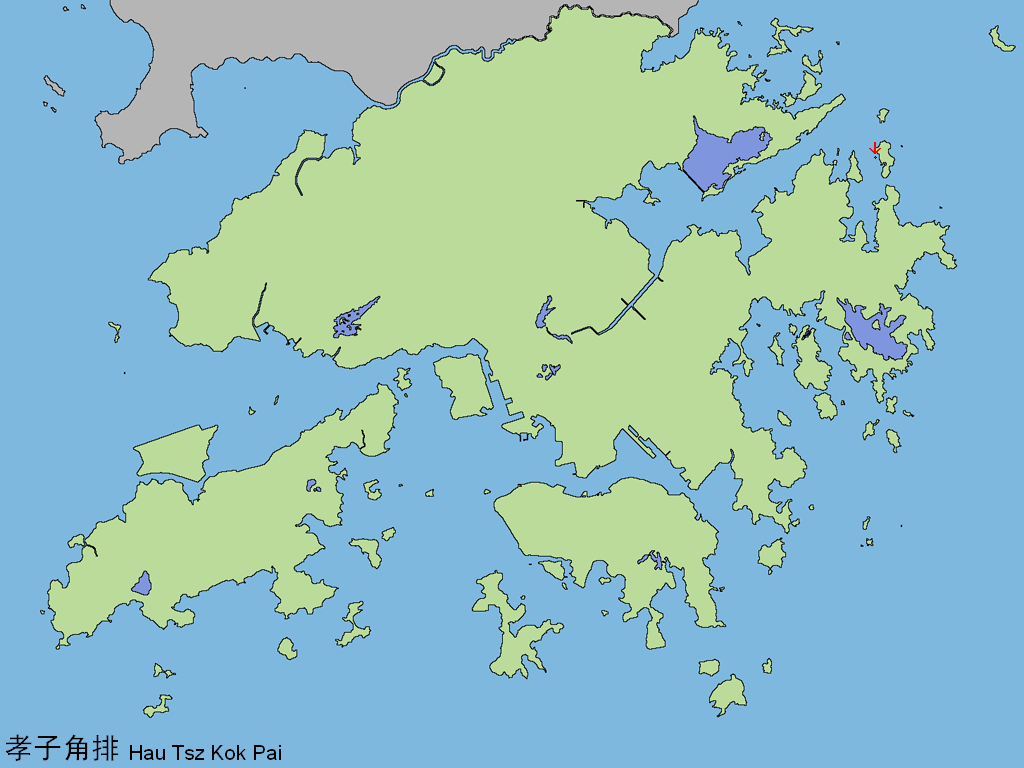 中文（香港）: 孝子角排。